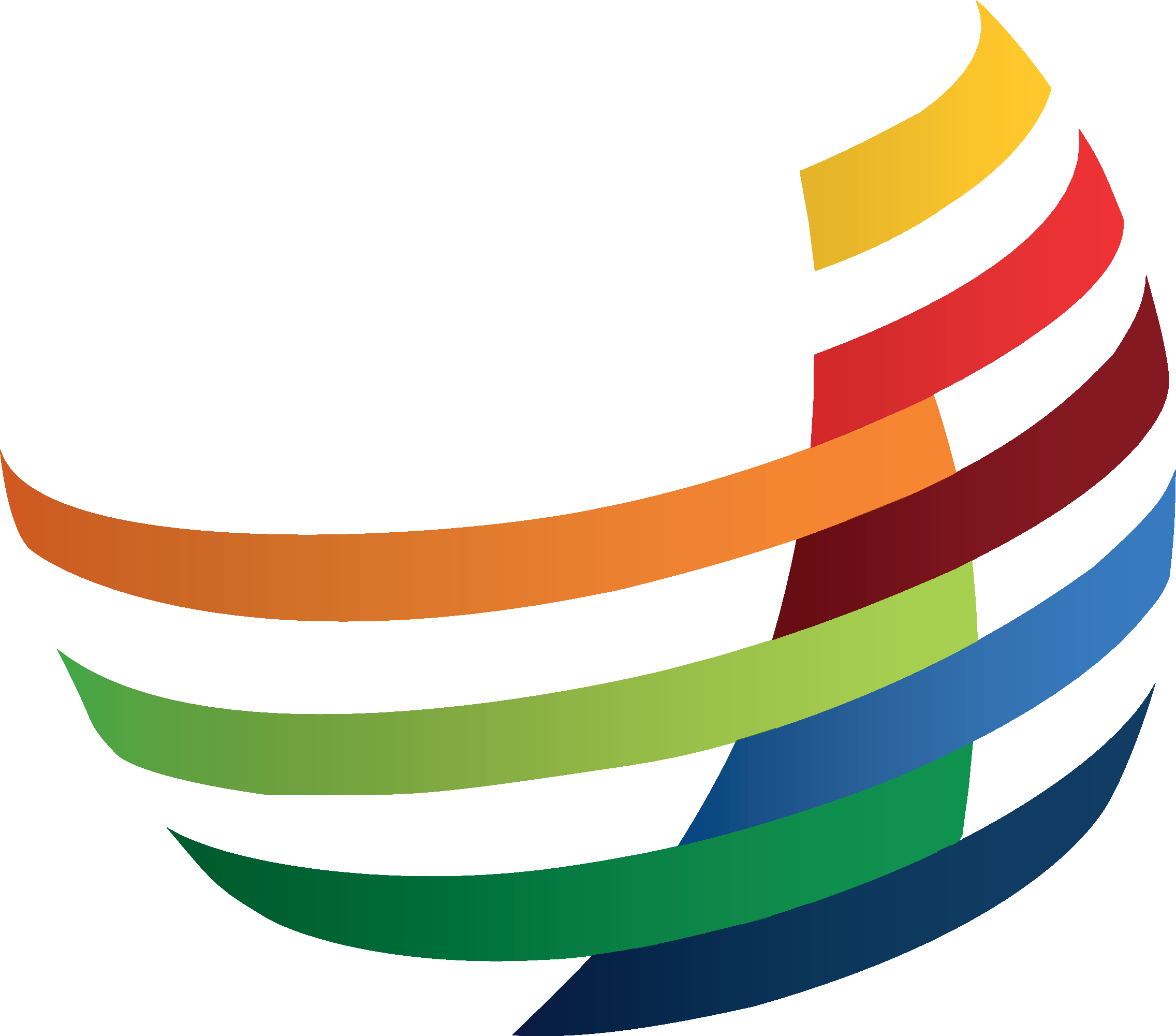 Símbolo da Universidade da Integração Internacional da Lusofonia Afro-Brasileira.